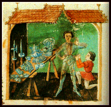 Средневековая миниатюра с рыцарем и оружием